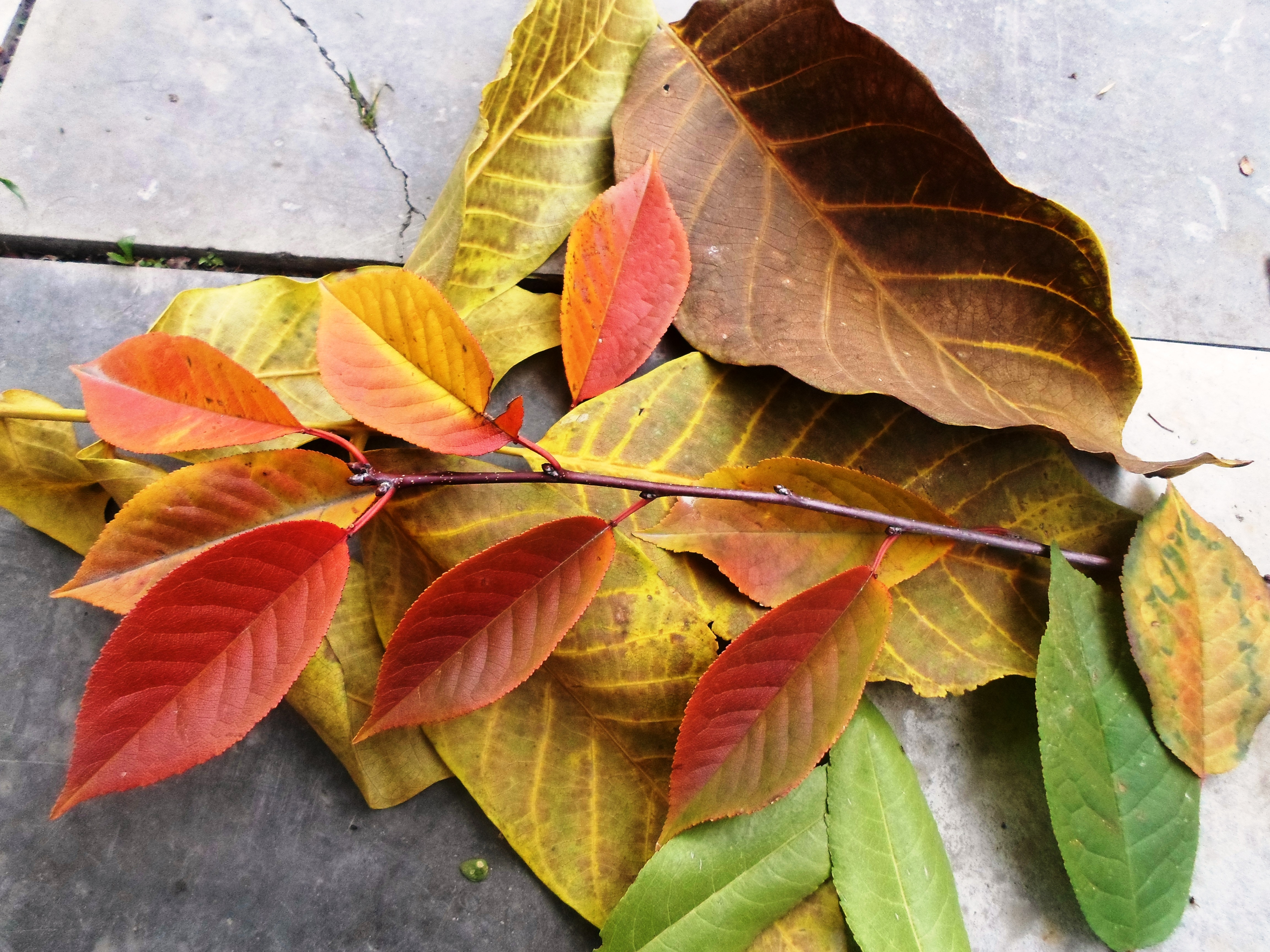 Листья грецкого ореха, вишни и миндаля